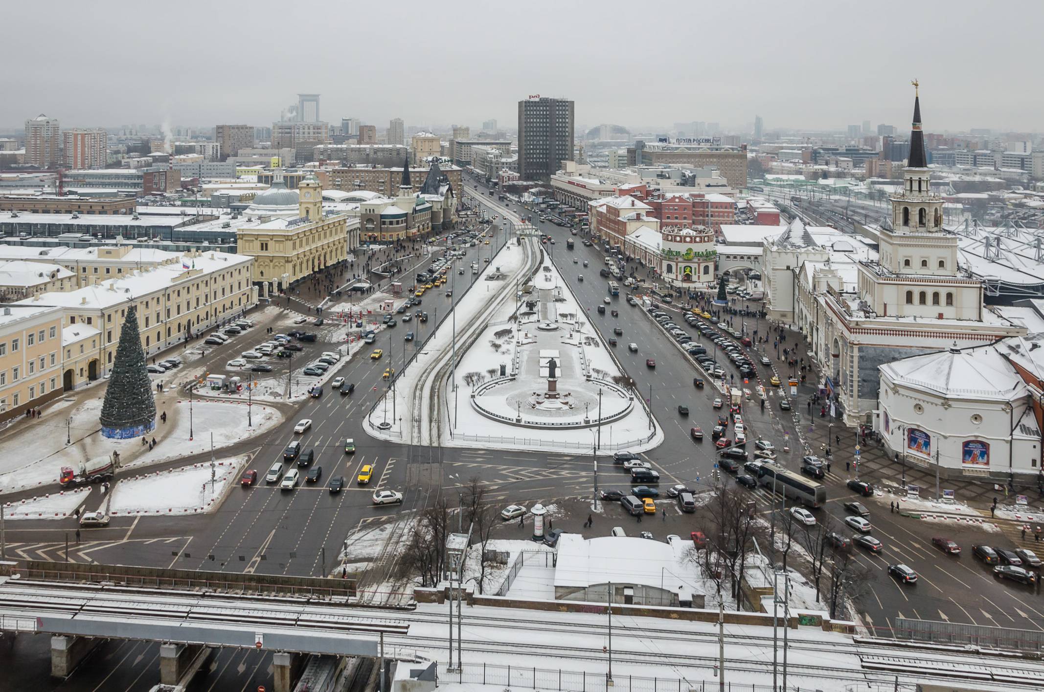 Komsomolskaya square as seen from Leningradskaya hotel in winter (2014) //Вид на Комсомольскую площадь из гостиницы Ленинградская